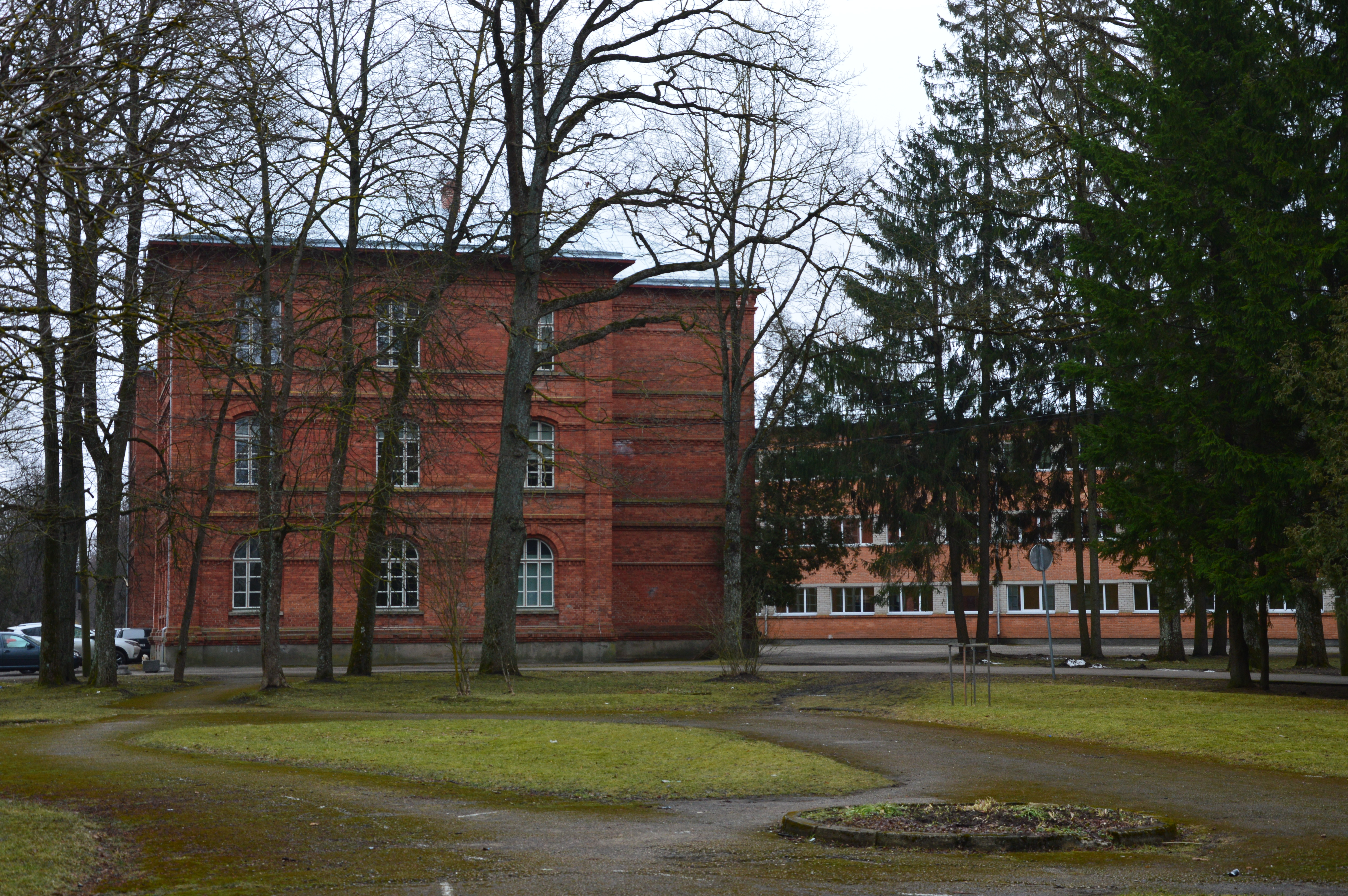 Kool-kiriku hoone Sindis Kooli tänav 9.